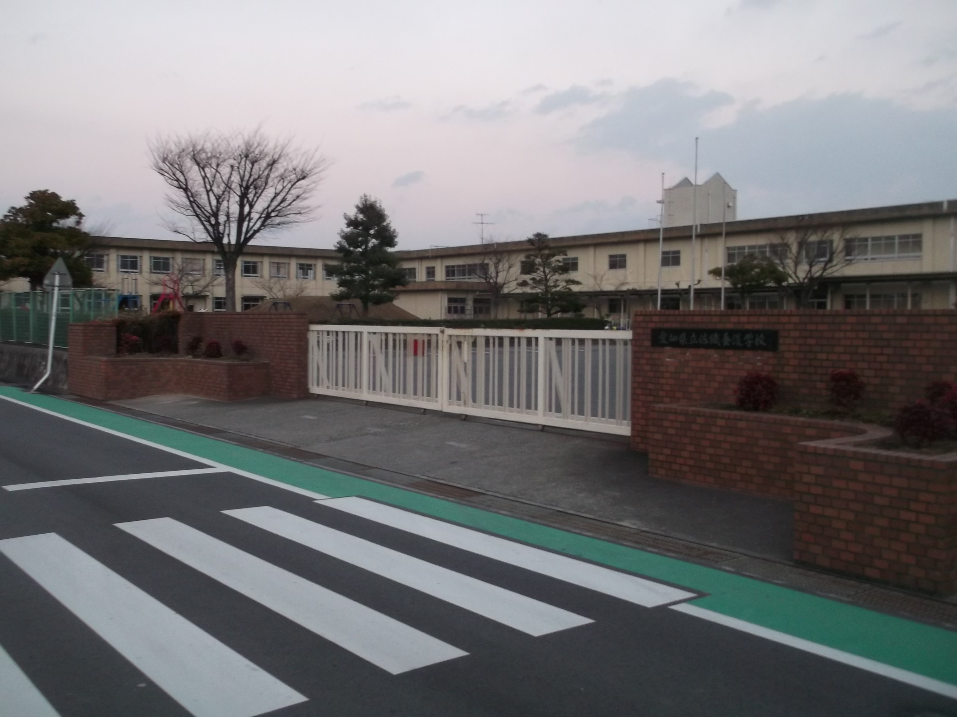 愛知県立佐織養護学校（愛知県愛西市西川端町）